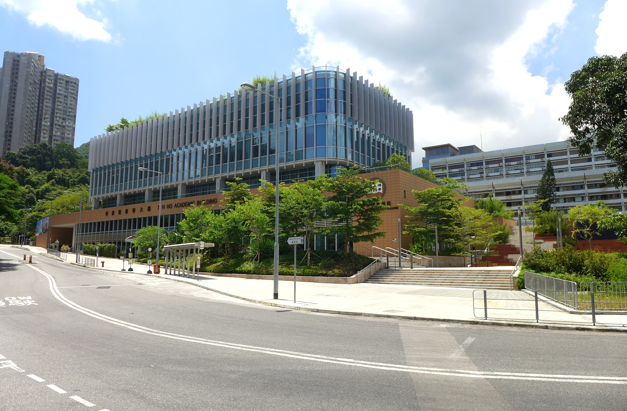 Hang Seng Management College